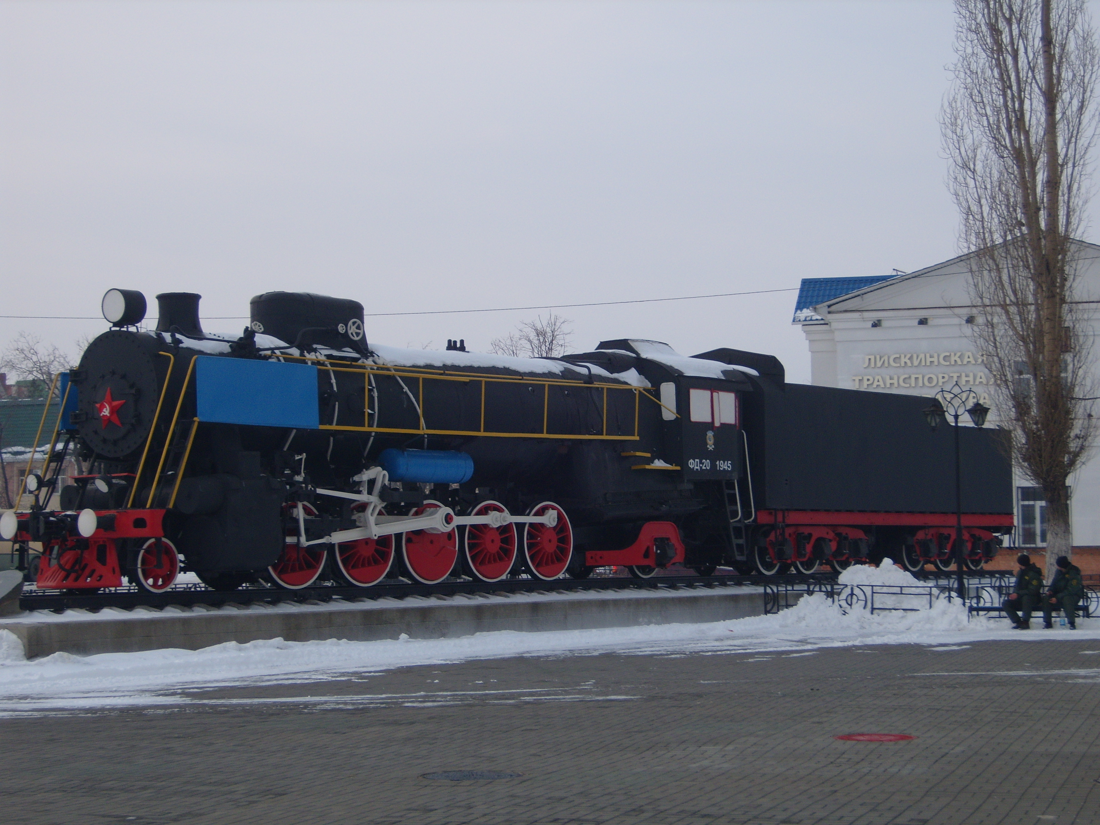 Паровоз